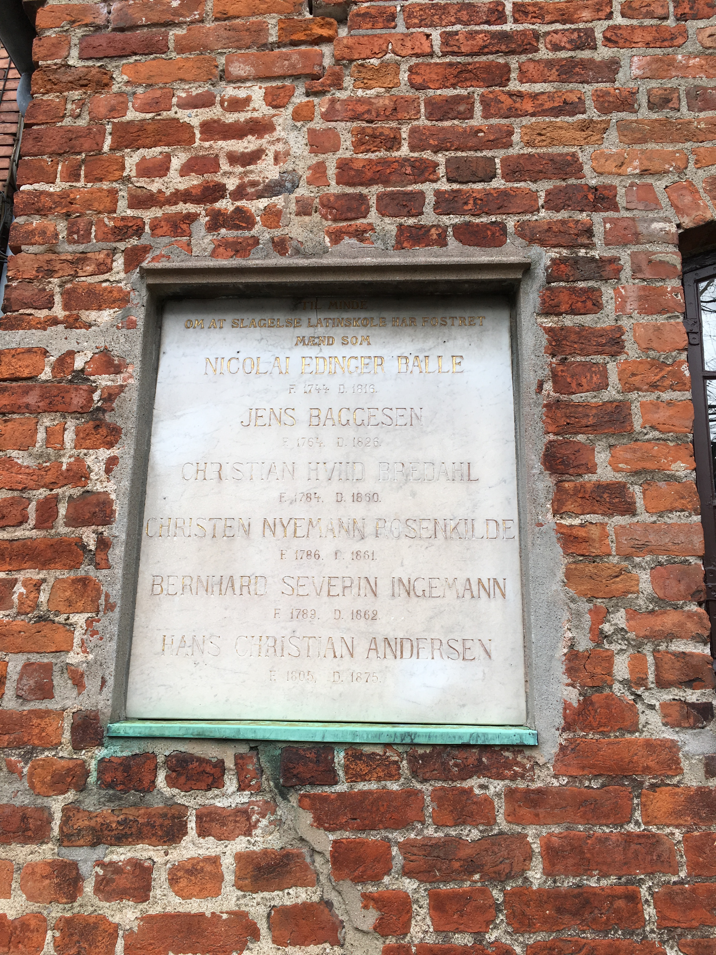 Marmortavle på gavlen af bygningen med kendte elever, der har gået på skolen.